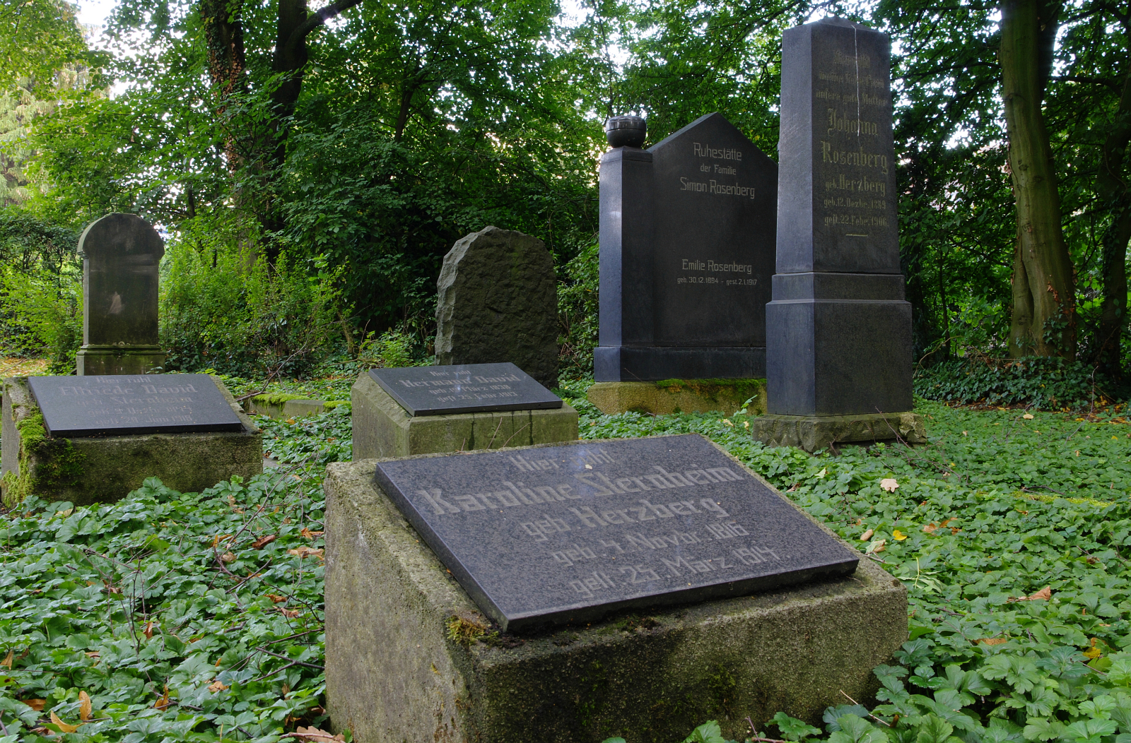 Kommunalfriedhof Dortmund-Aplerbeck. Abschnitt mit jüdischen Grabstätten